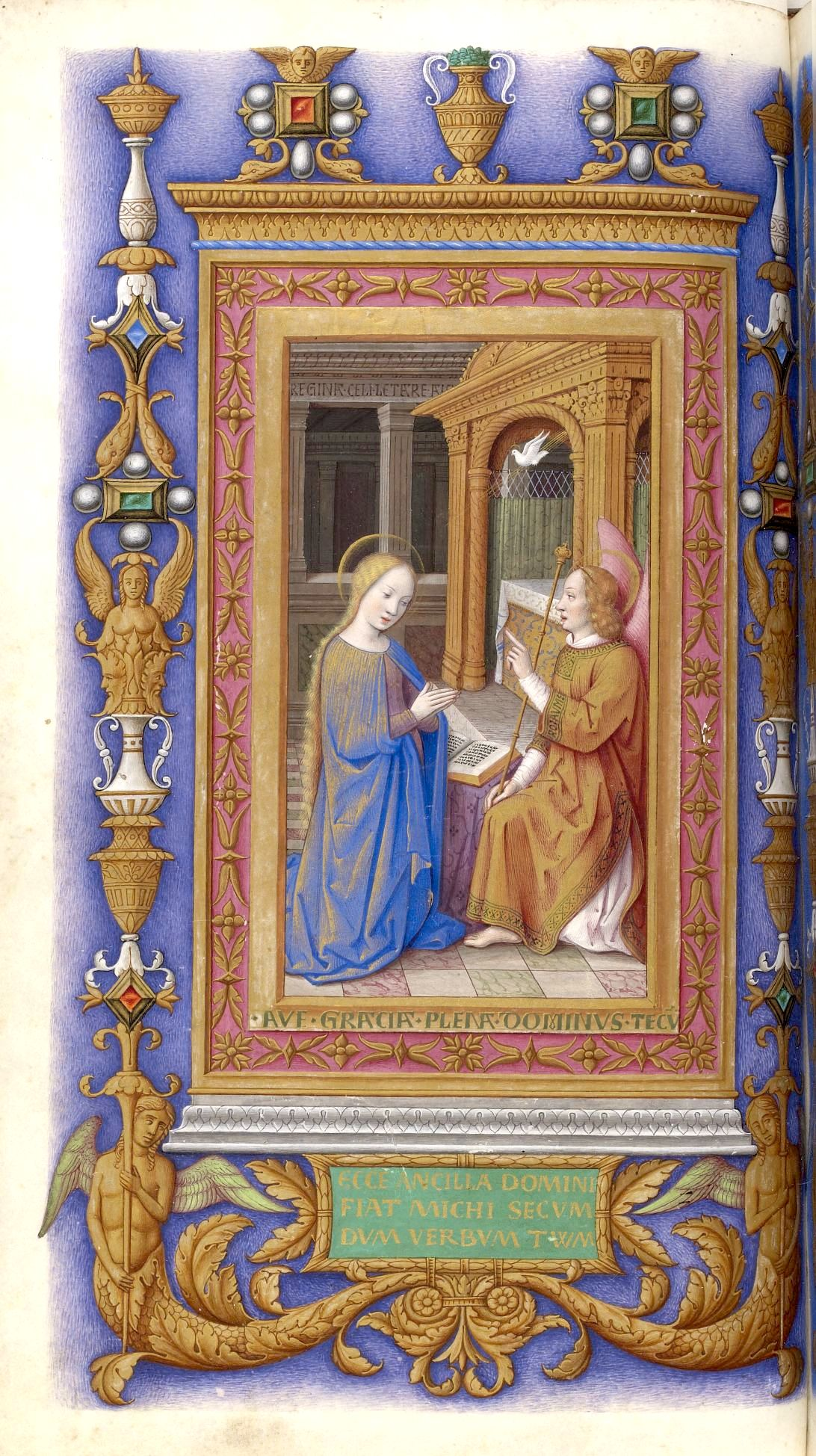 Aragon-f106-Annonciation